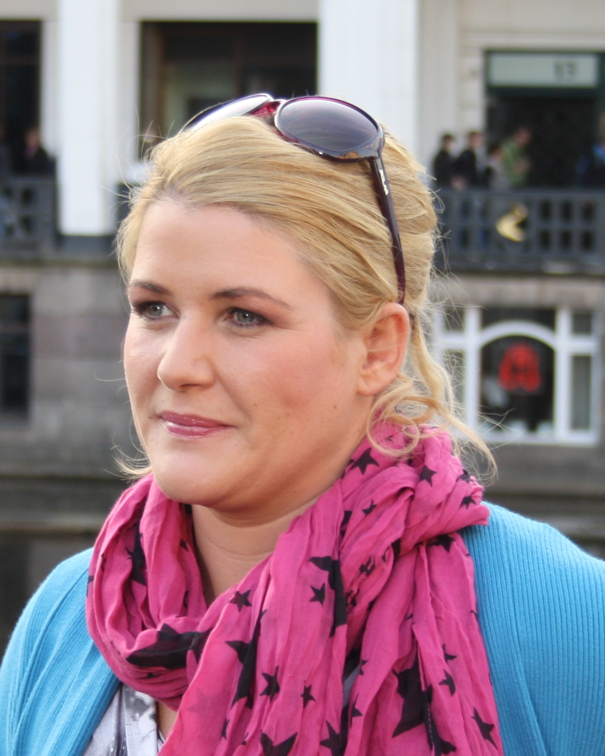 Anke Harnack auf dem Deutschen Evangelischen Kirchentag 2013 in Hamburg